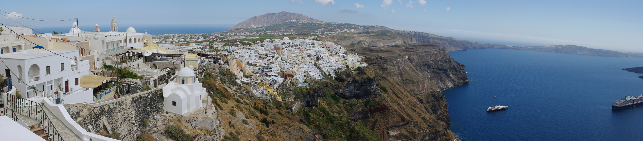 Santorini: Firostefani und Fira, Berg im Hintergrund der Profitis Elias